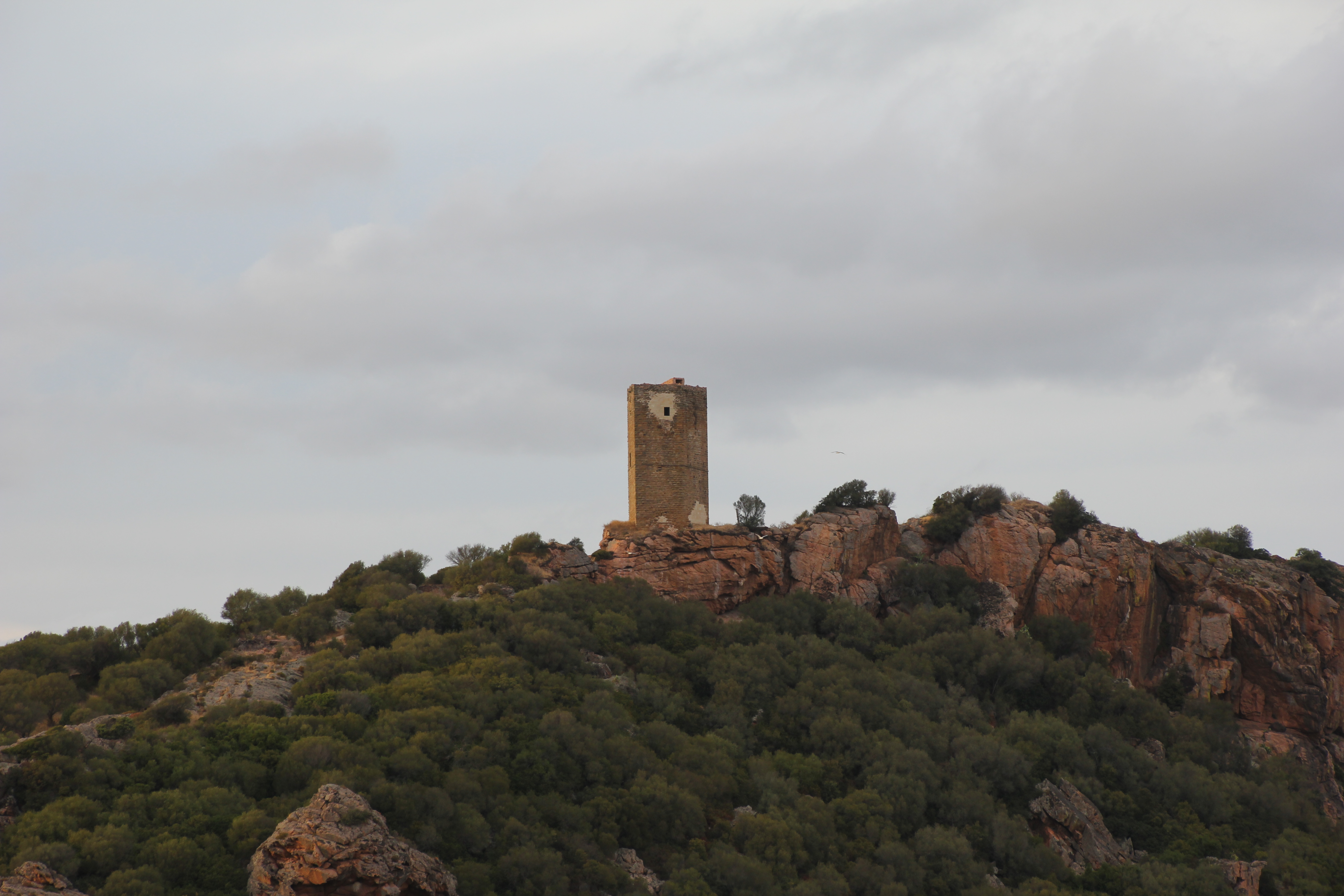 Santa Maria Coghinas, castello di Casteldoria